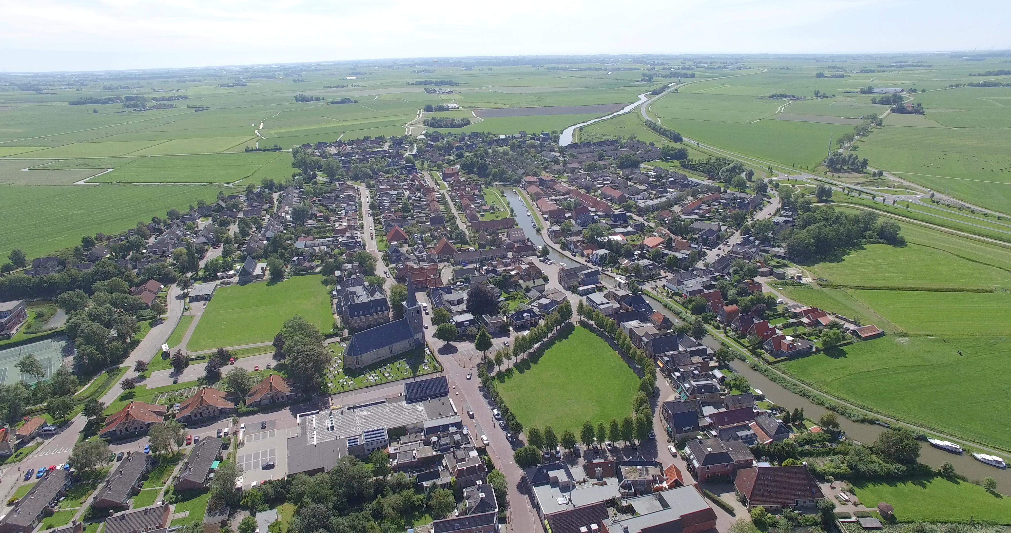 Wommels